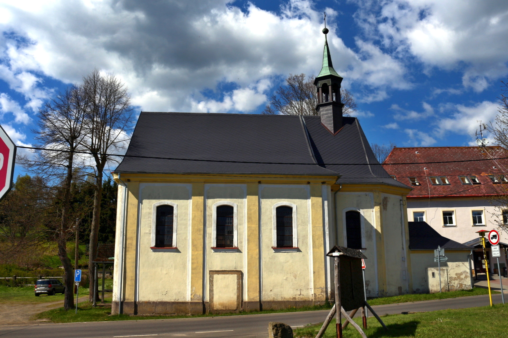 Kostel 14 Sv. pomocníků v Krompachu